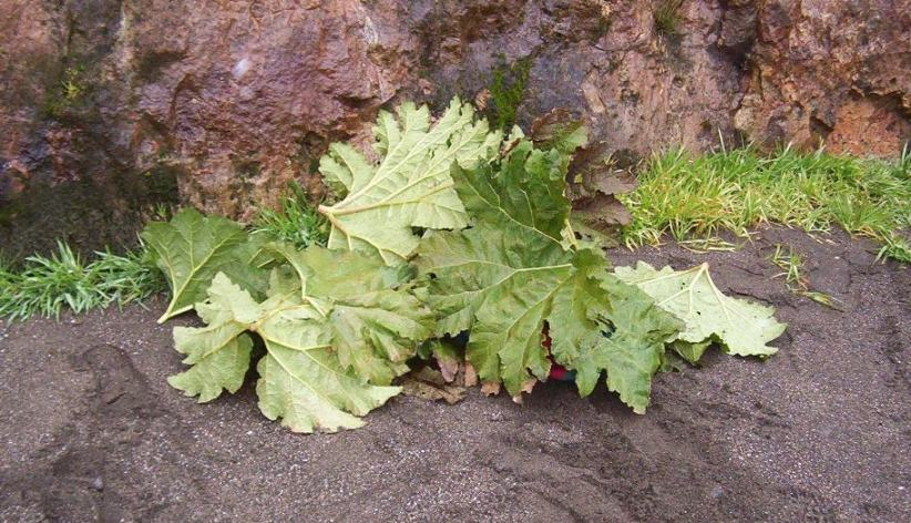 Pangues, hojas de Gunnera tinctoria, cortadas en Niebla, (Valdivia, Chile) para preparar un curanto